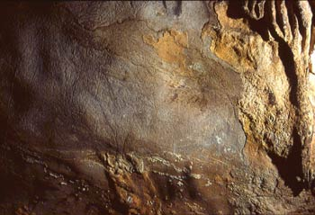 Cueva de el Cuco, Cantabria, España Paleolítico superior